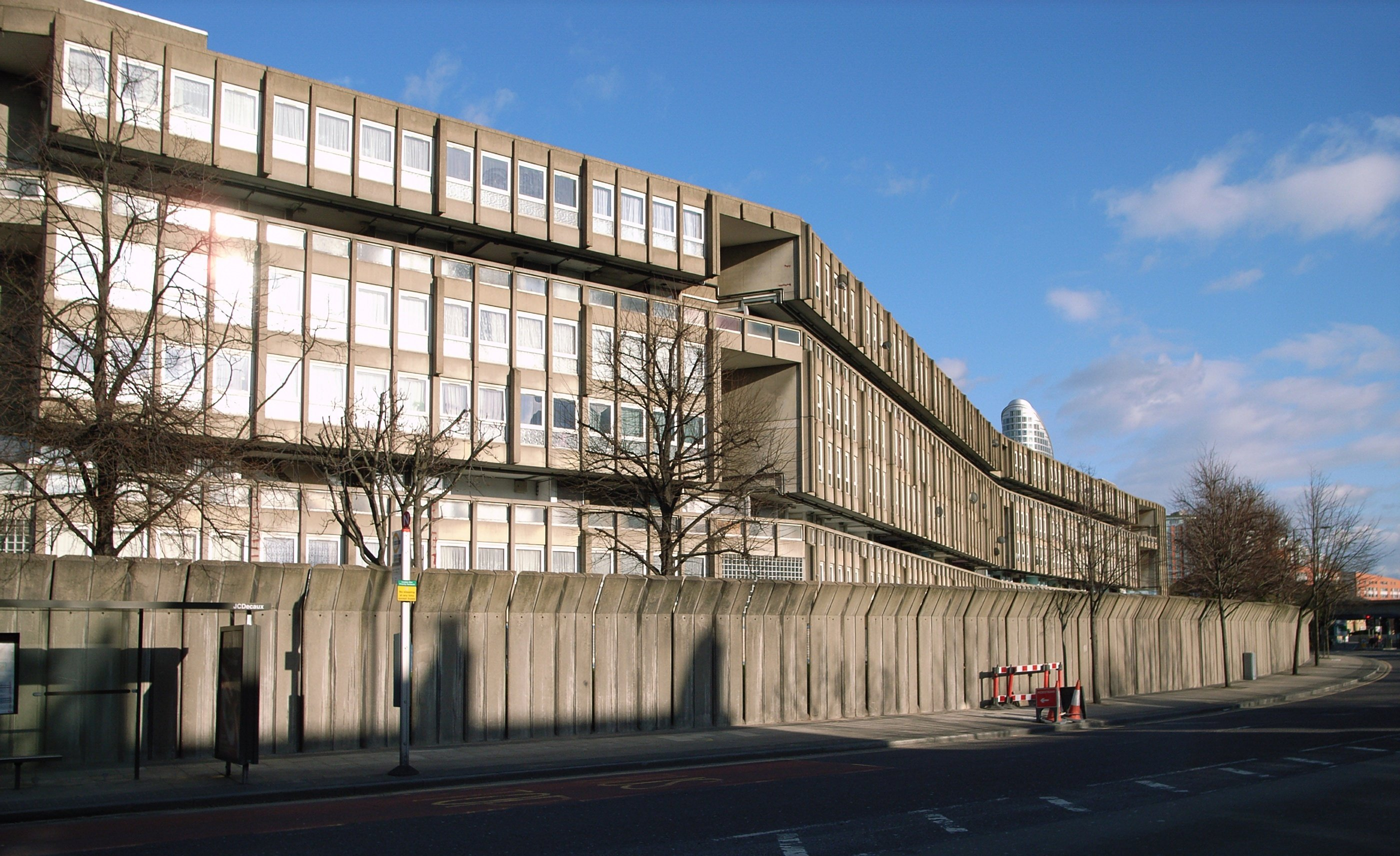 Robin Hood Gardens eraikina, Alison eta Peter Smithsonena.